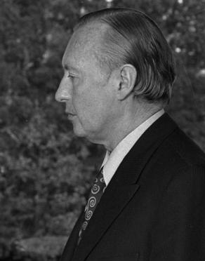 Sitzung der deutsch-französischen Kulturstiftung im Konrad Adenauer Haus in Rhöndorf.